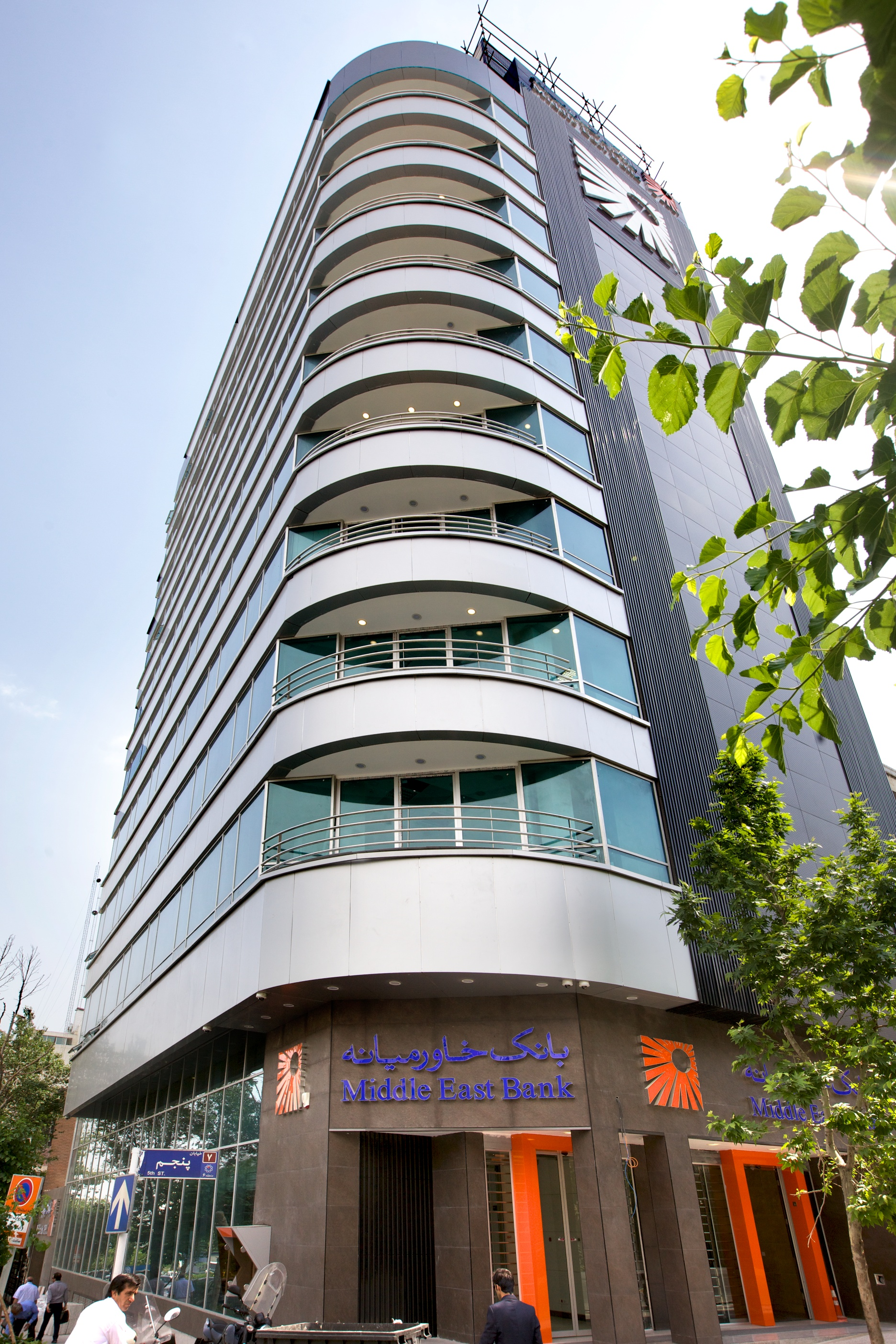 بانک خاورمیانه. ایران